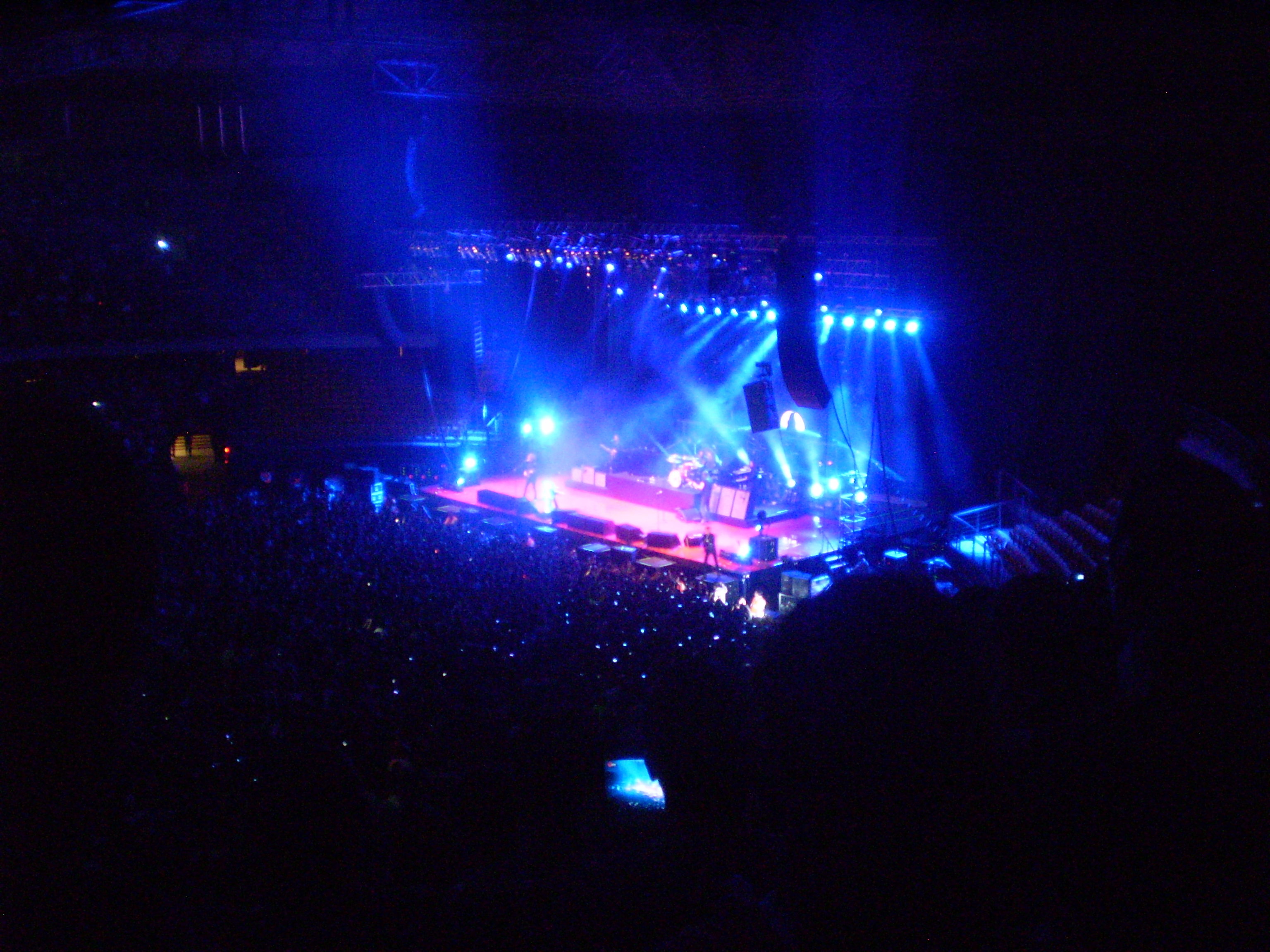 El grupo estadounidense The Killers presentándose en el Movistar Arena con motivo de su gira Battle Born World Tour. Santiago de Chile, 2 de abril de 2013.